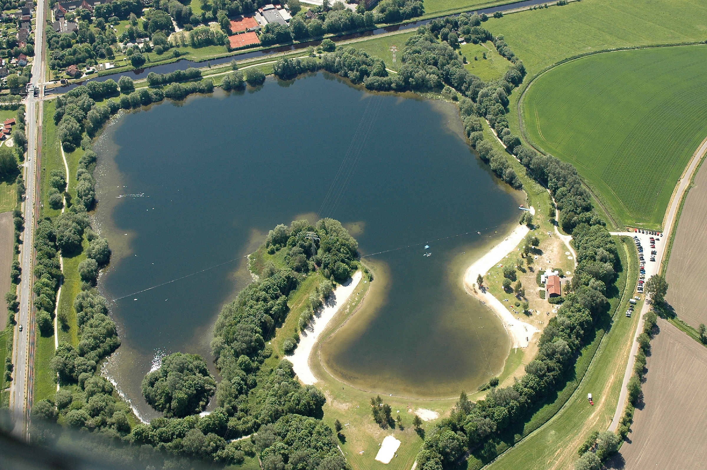 Sander See in Sande (Friesland) Fotoflug vom Flugplatz Nordholz-Spieka über Cuxhaven und Wilhelmshaven